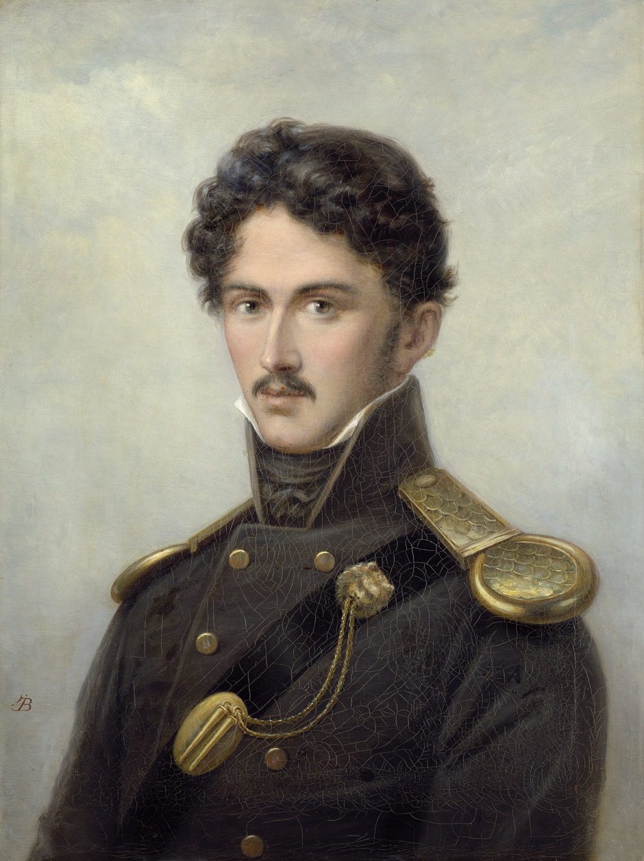 Posthumes Portrait des Schriftstellers Theodor Körner. Öl auf Leinwand. 67,5 x 50 cm. Links unten mit einem Monogramm "JTB" (?).